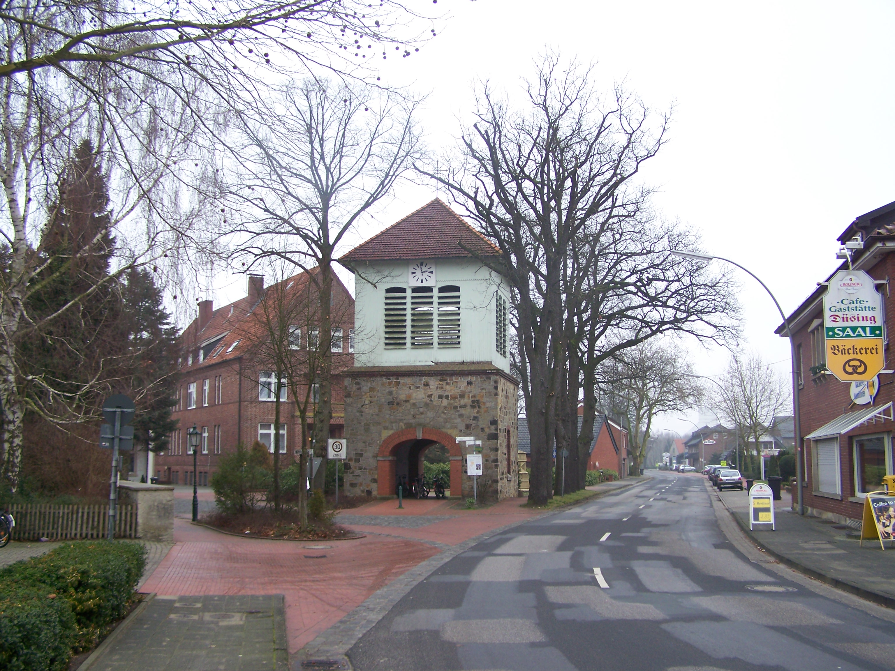 Alter Glockenturm in Schapen, Niedersachsen.